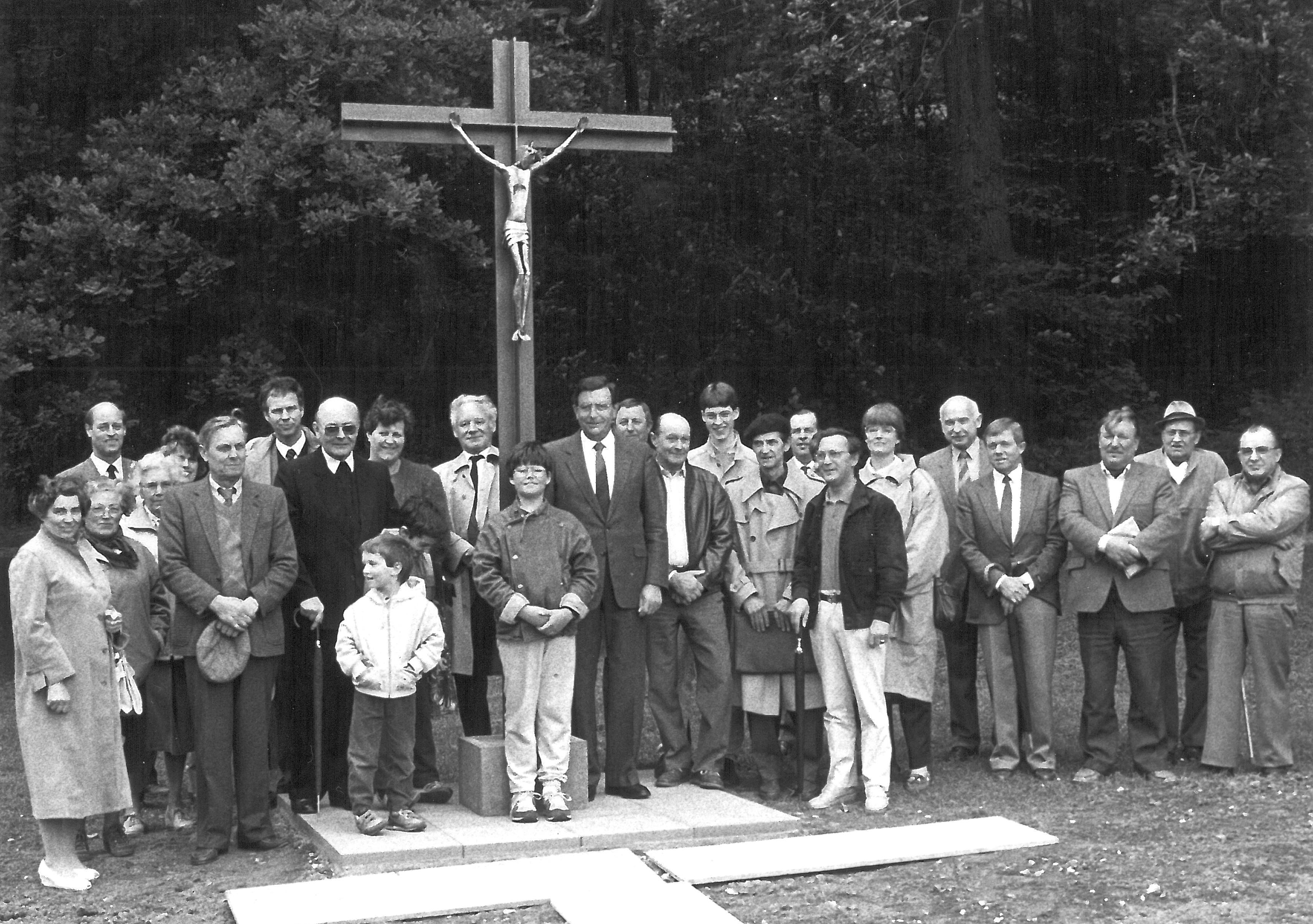 Inauguration de la croix du village de Nörvenich (Allemagne) le 19.06.1987 sous la présence de l'artiste Jean Vincent de Crozals ainsi que de son épouse et ses fils.